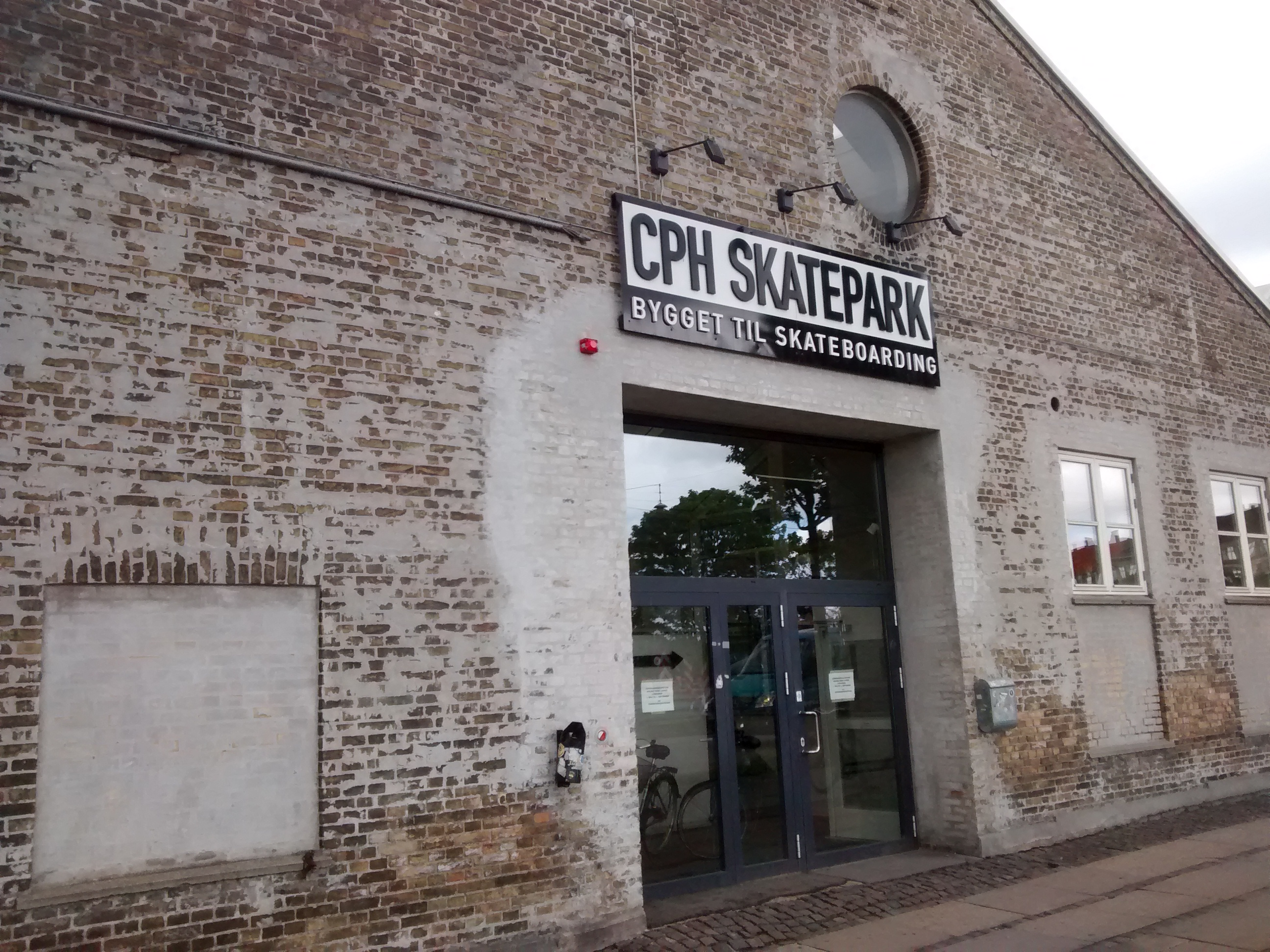 Copenhagen Skatepark